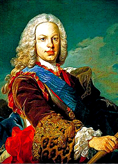 Variante digital del cuadro pintado por Louis-Michel van Loo